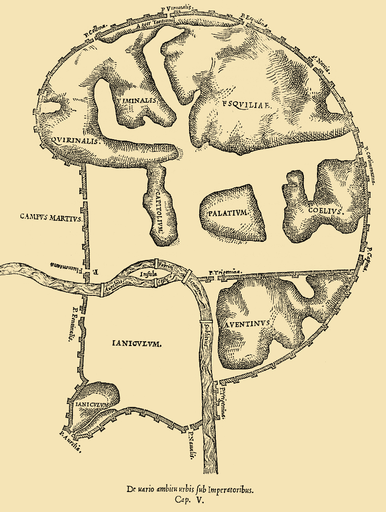 Représentation de Rome parue dans Urbis Romae Topographia, écrite par Bartolomeo Marliani. Édition de 1544 par les frères Dorici et Alosii.